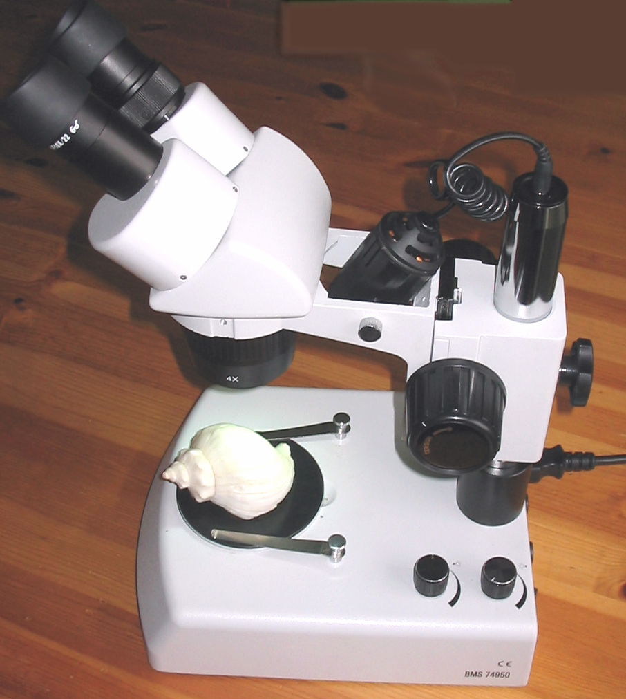 Fotografía de Pablo Alberto Salguero Quiles. La diferencia principal del microscopio estereoscópico es que no es necesario que la luz pase a través del objeto para poderlo ver, el objeto se ve en tres dimensiones, y a una distancia variable de entre 3 cm y 8 cm. Lo que permite como en este caso poner un objeto de 4 cm de diámetro.